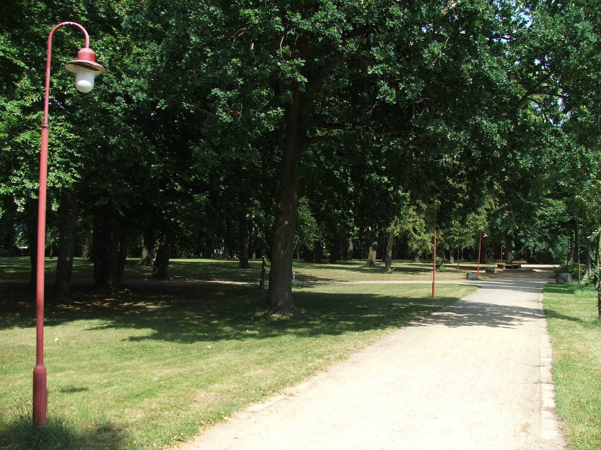 Stadtpark Falkenberg/Elster